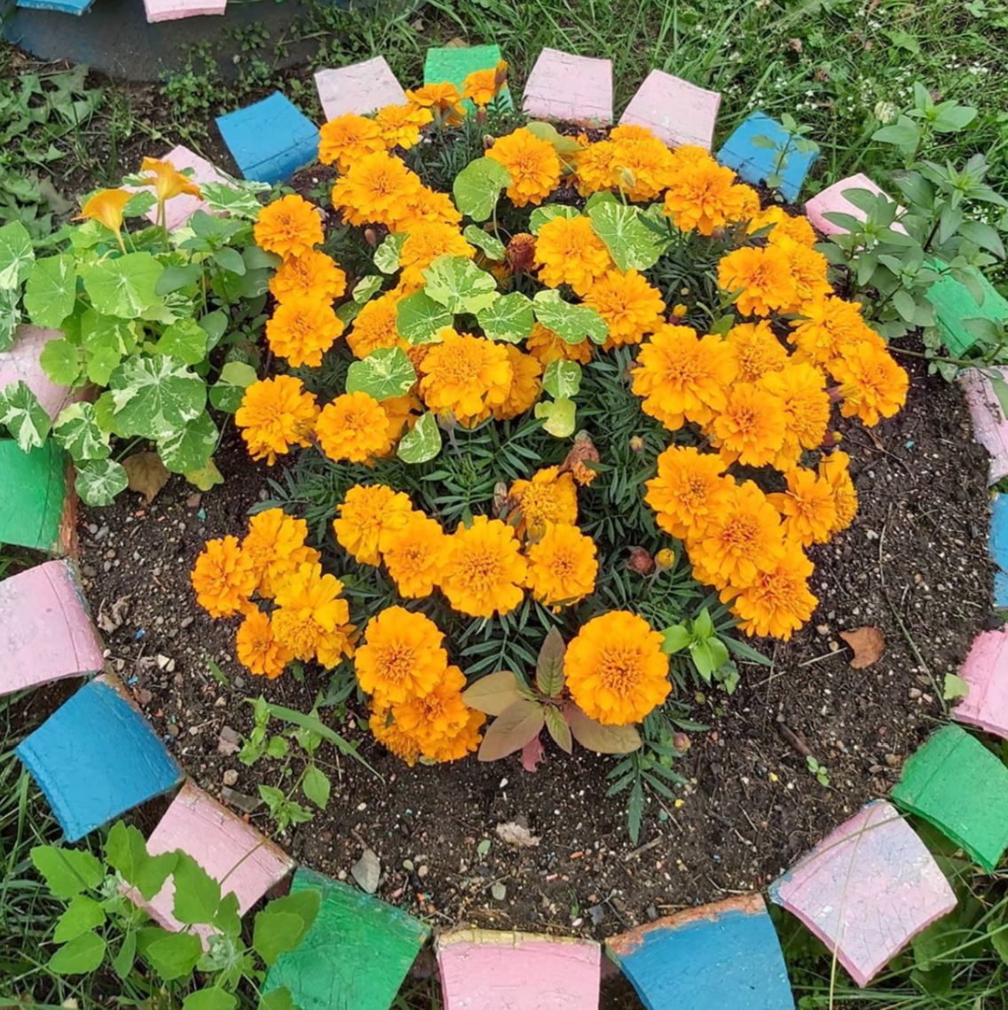 Marigold flowers. Eastern Siberia